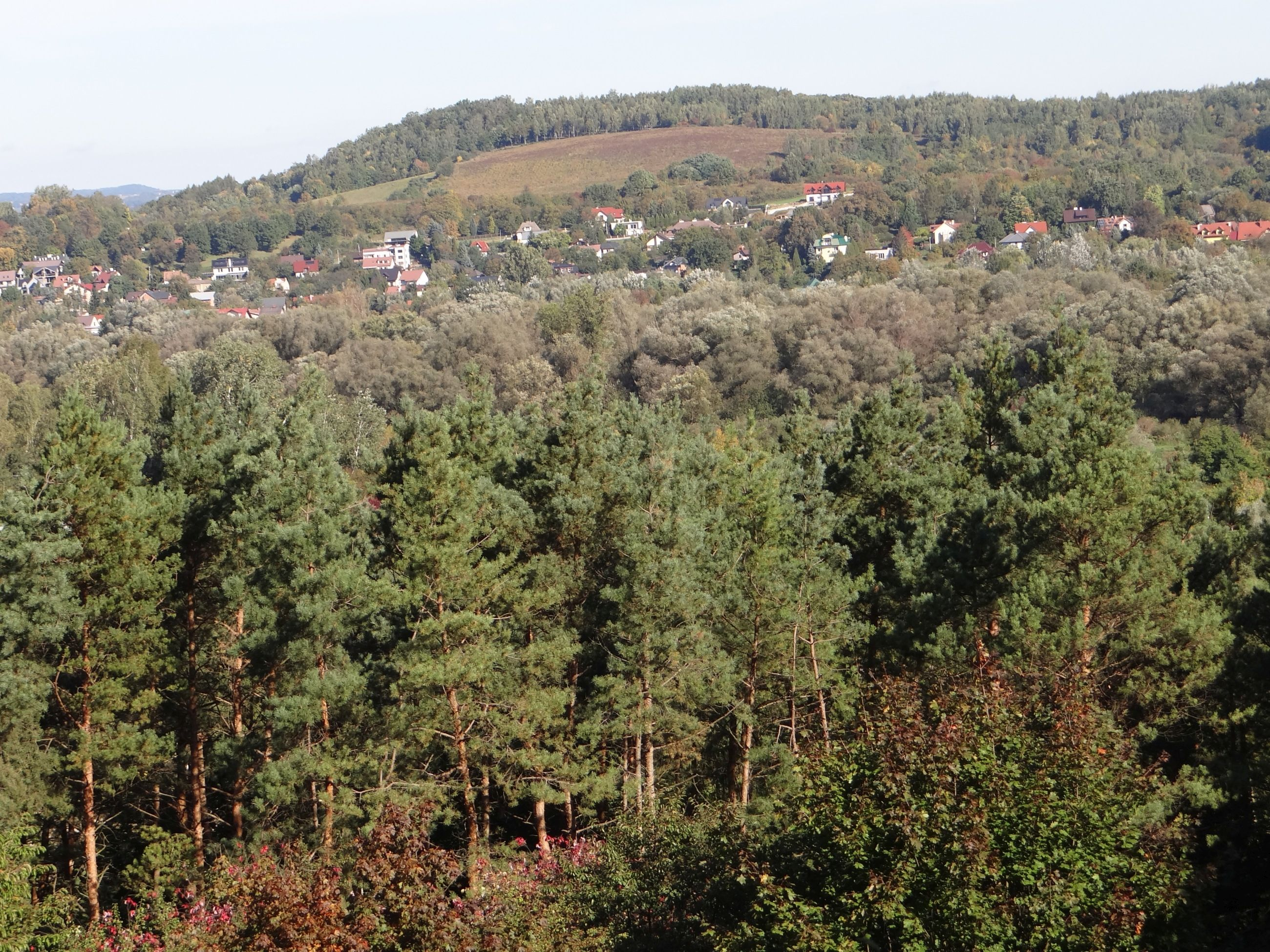 Widok z Górki Pychowickiej